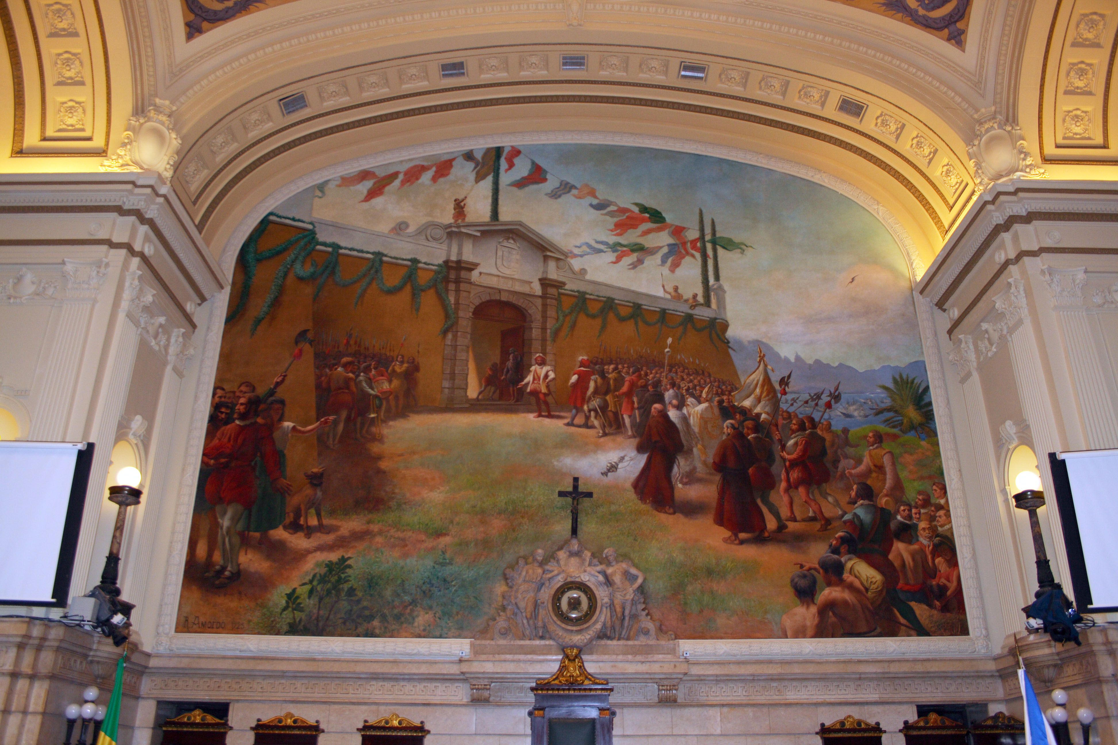 Painel de Rodolfo Amoedo, assinado e datado 1923, na parede ao fundo da Mesa do Plenário.